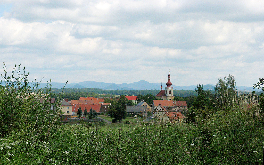 Výlet na Vlhošť a Ronov 24. 6. 2007